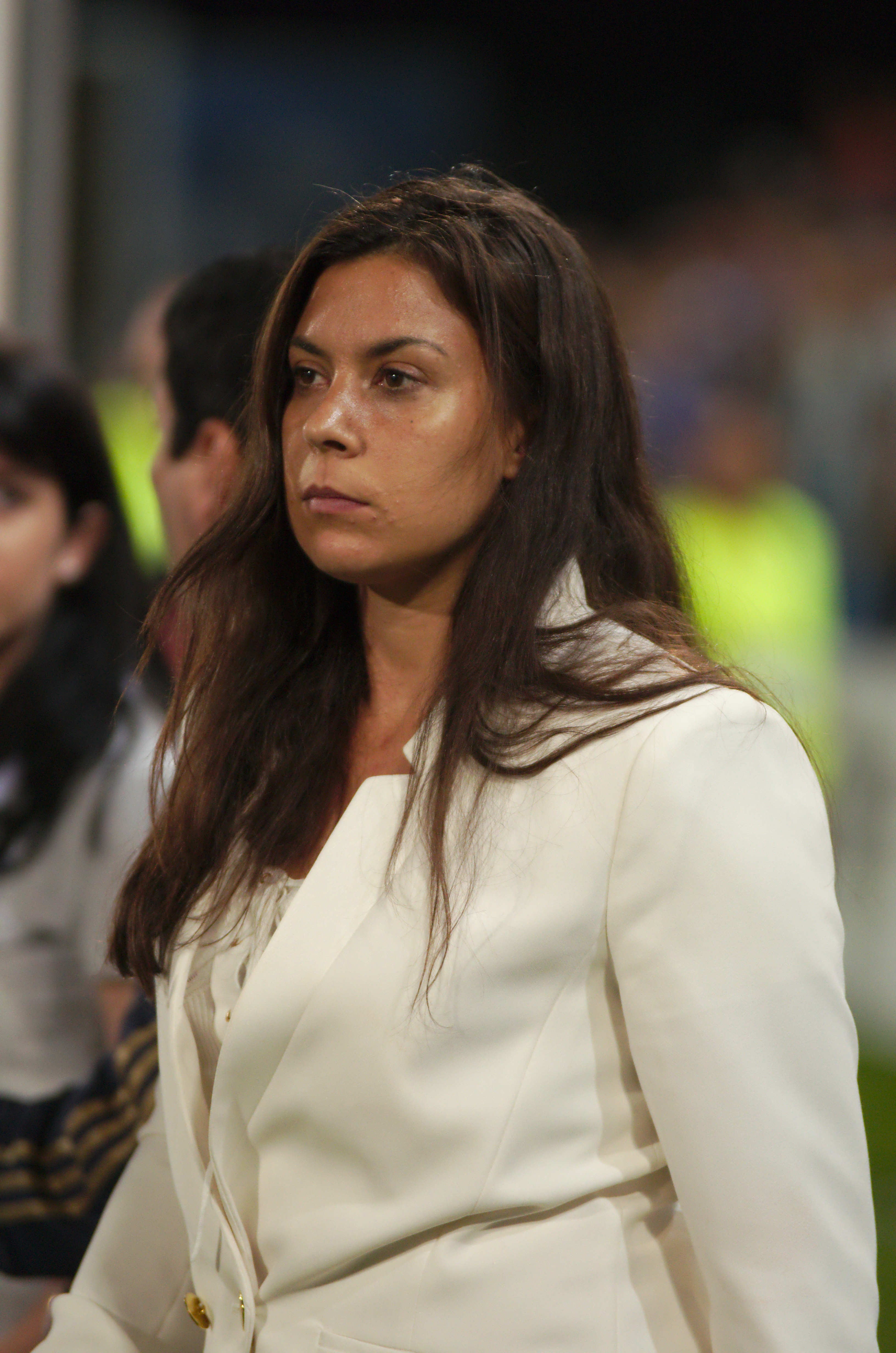 Valais Cup 2013 - OM-FC Porto - 20130713 - Marion Bartoli